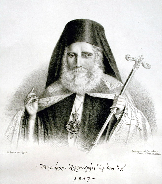 Патриарх Александрийский Иерофей I